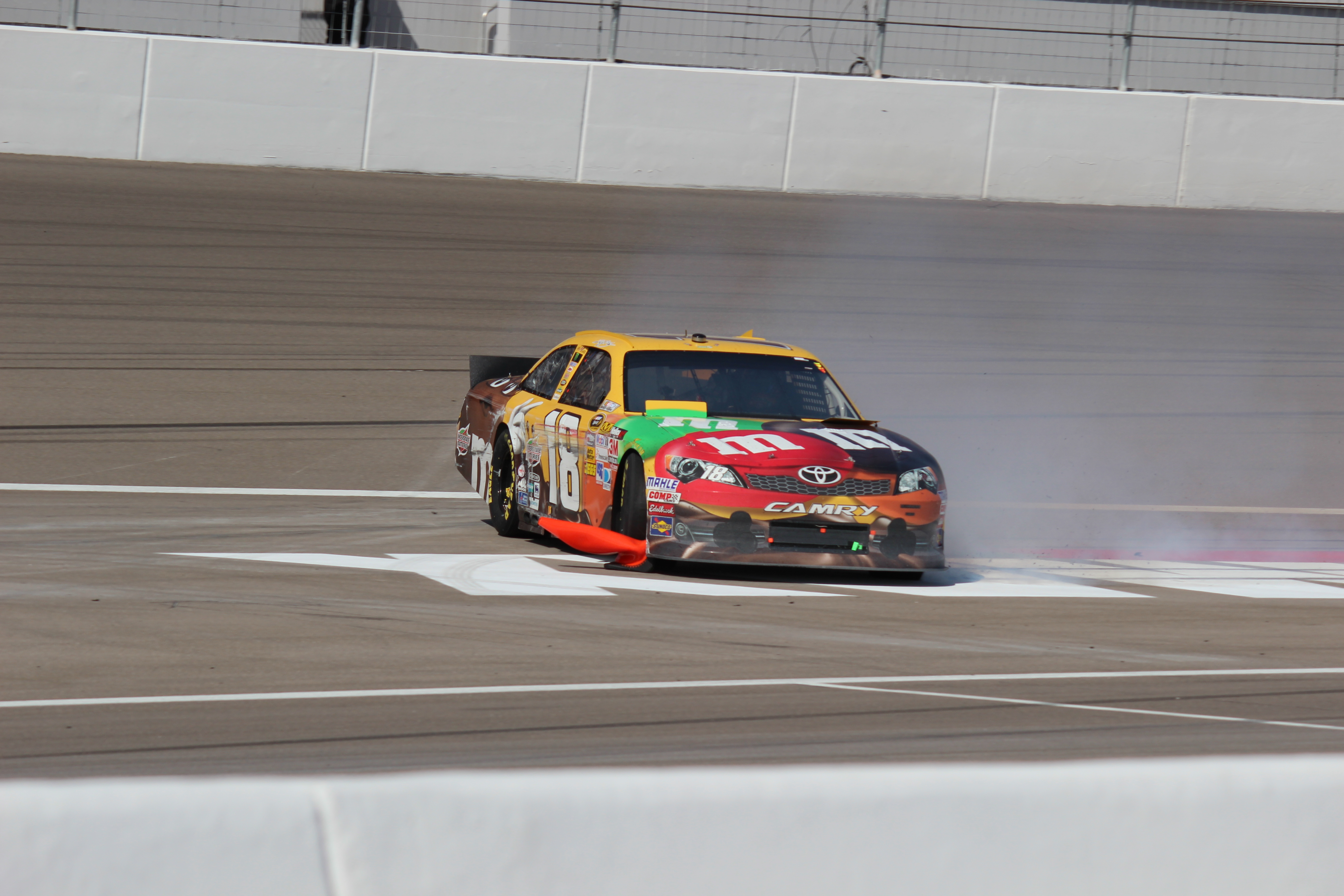 Kyle Busch melintir